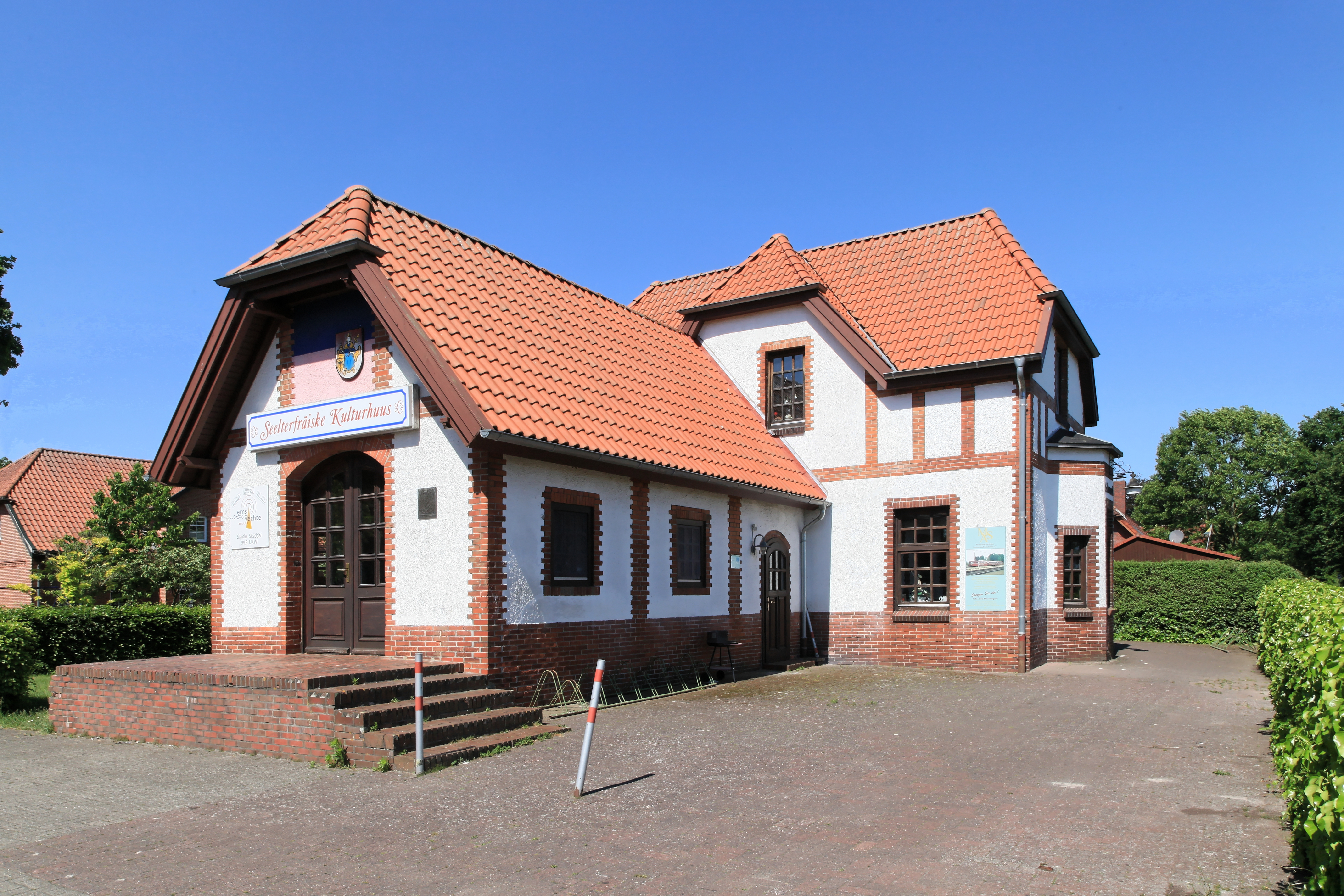 Ehemaliger Bahnhof, jetzt Heimathaus, Eisenbahnstraße in Scharrel, Saterland